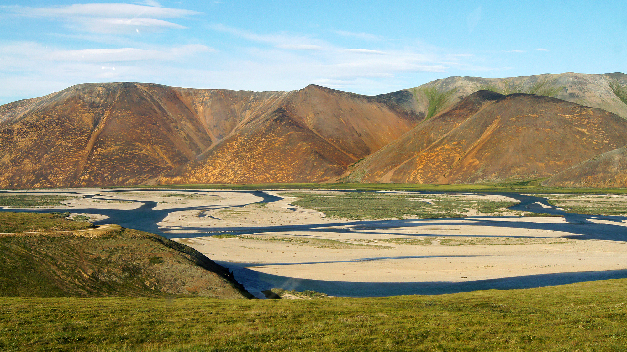 Паляваамский: Территория памятника включает пойму и горное правобережье р. Паляваам в среднем течении, выше устья р. Левтутвеем и вверх выше р. Голубой, Иультинский район, Чукотский автономный округ This image is related to the protected area of Russia number 8710025